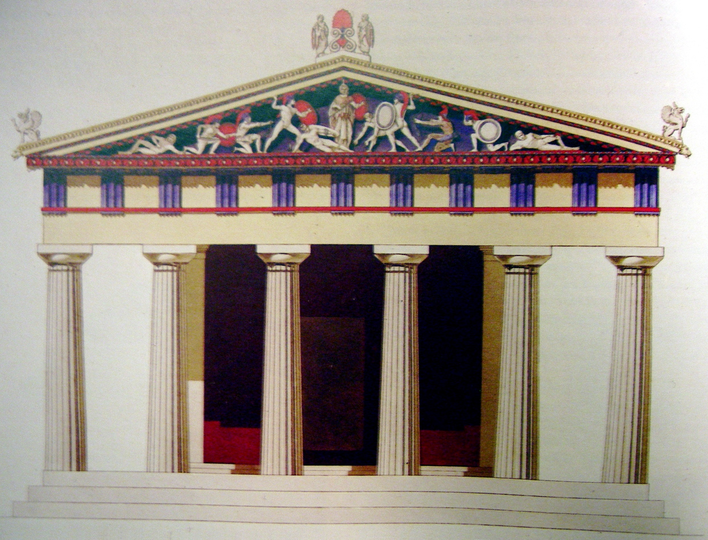 Abel Blouet et Pierre Félix Trézel, «Temple de Jupiter Panhellénien. Façade Ouest restaurée.» in Expédition scientifique de Morée. Section des Beaux-Arts., tome III, planche 55., 1831. Il s'agit en fait du temple d'Aphaïa, considéré en 1831 comme Temple de Jupiter Panhellénien. La planche participe au grand débat de l'époque sur la polychromie des temples grecs. Source : photo personnelle de la planche.